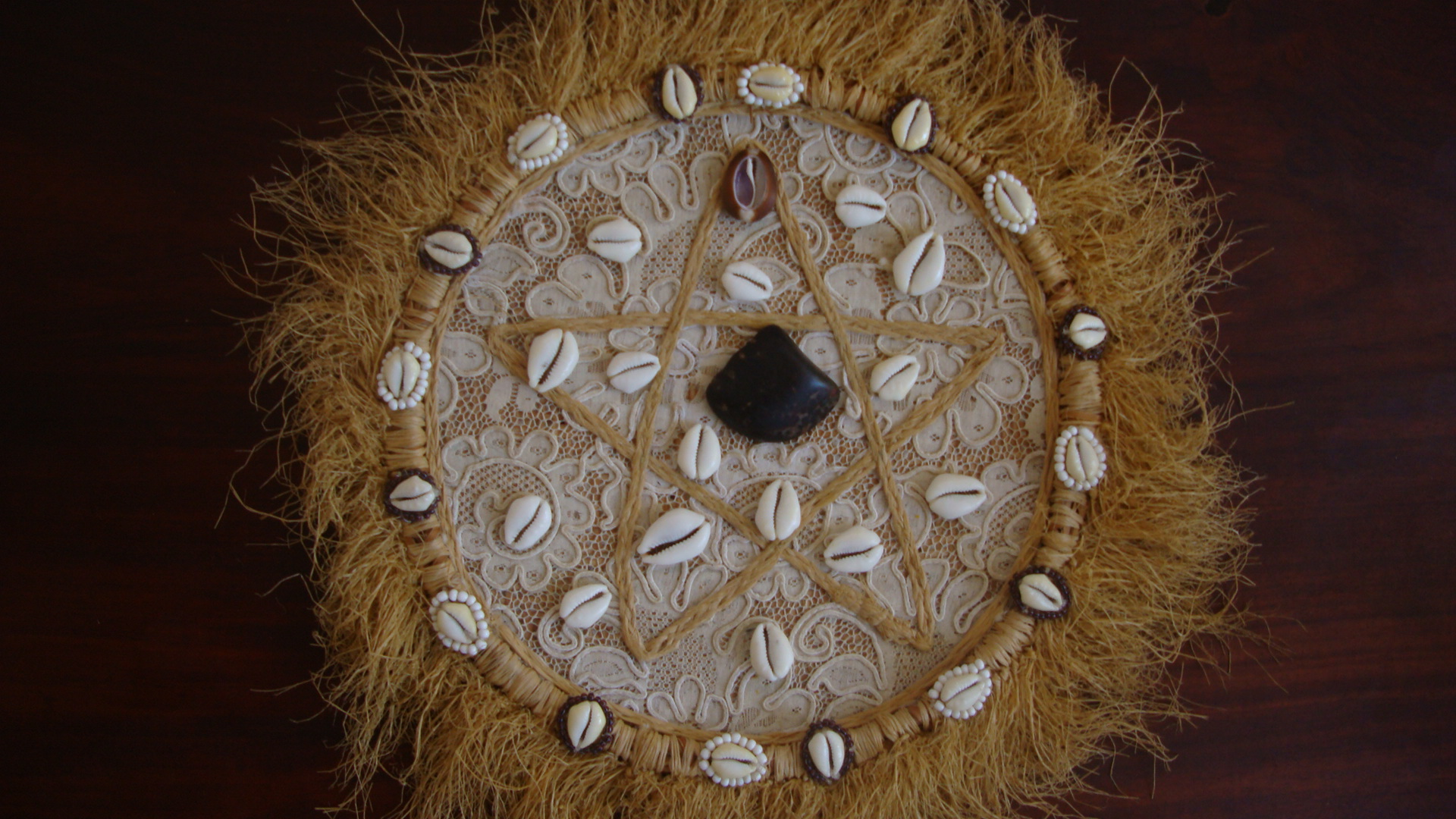 Odu Obéogundá Merindilogun, Salvador, Bahia, Brasil.